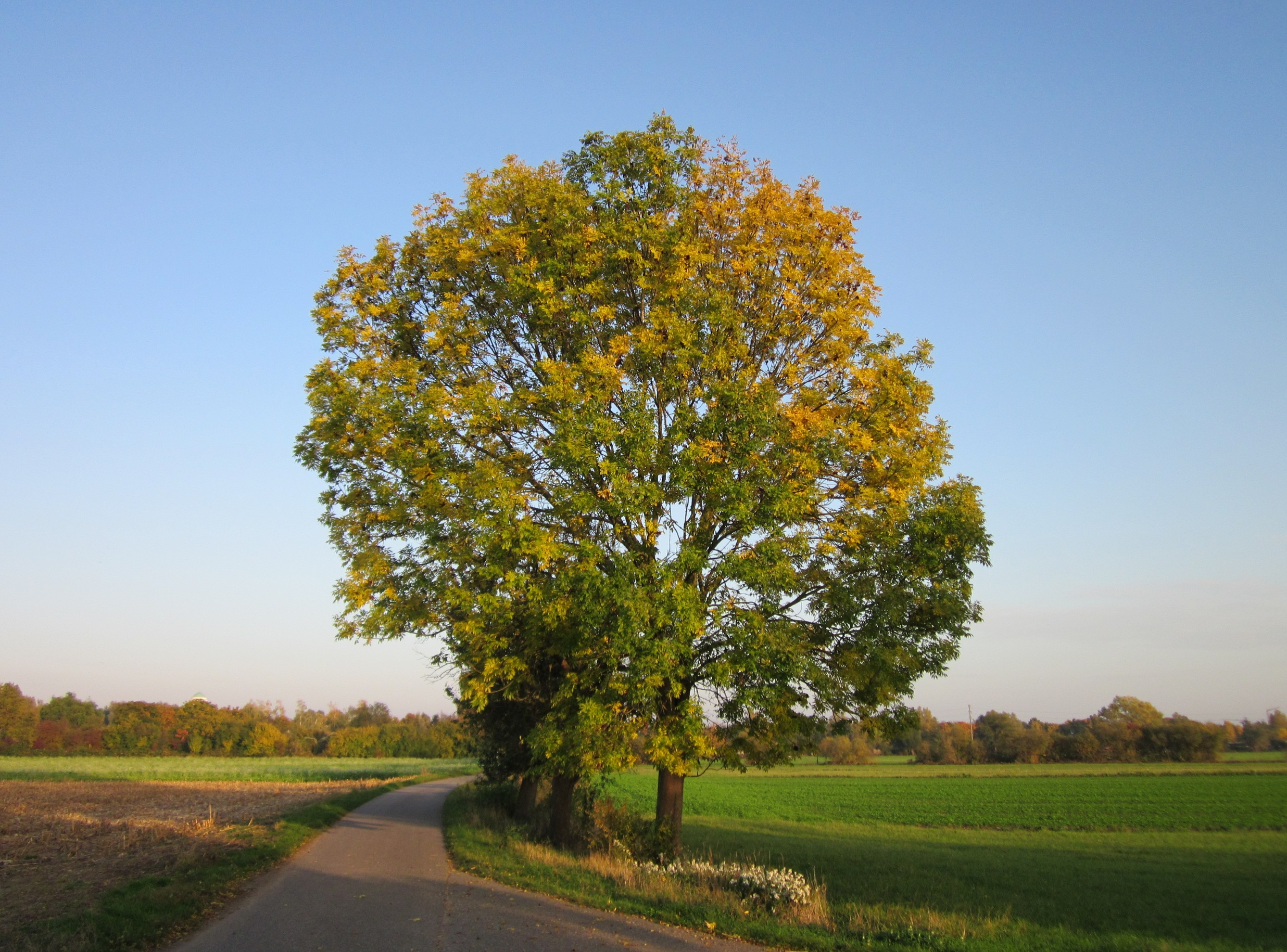 Esche (Fraxinus excelsior) im Hockenheimer Rheinbogen